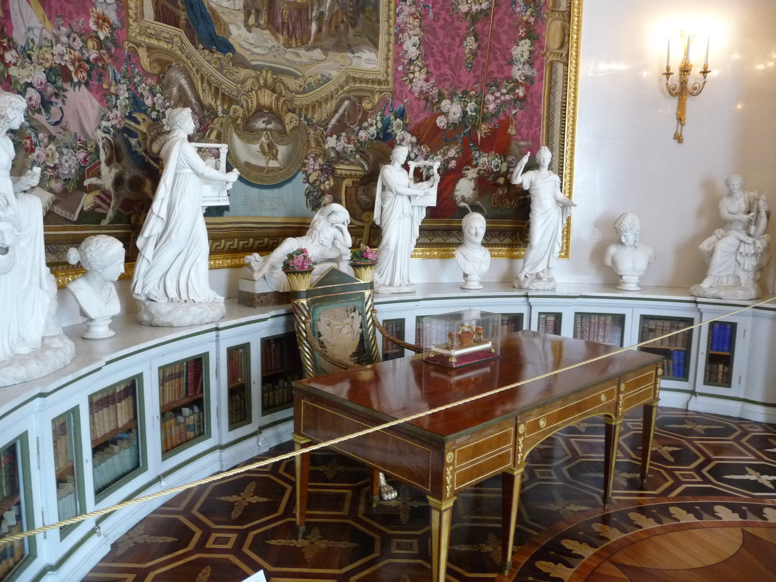 Palace-table-p1030767.jpg